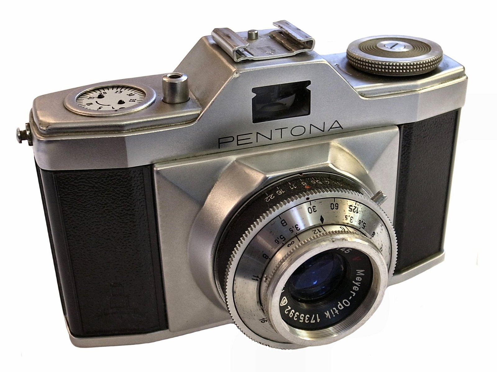 Pentacon, Pentona, Breite 133 mm, Tiefe 68 mm, Höhe 86 mm, Gewicht 365 g